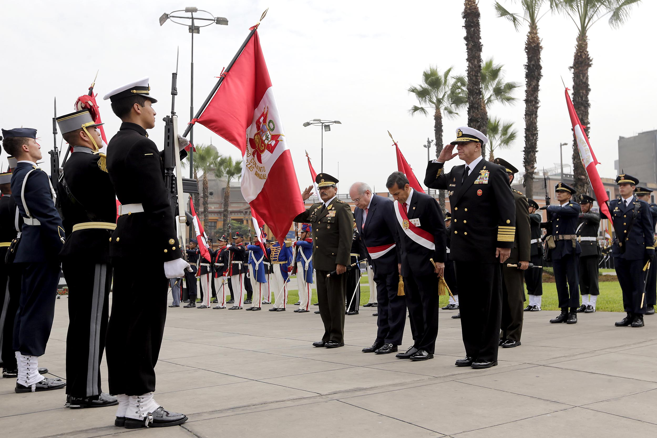 El ministro de Defensa, Pedro Cateriano Bellido, participó esta mañana en la ceremonia de conmemoración por el 133 aniversario de la Batalla de Arica y de renovación del juramento de fidelidad a la Bandera por parte de las Fuerzas Armadas.